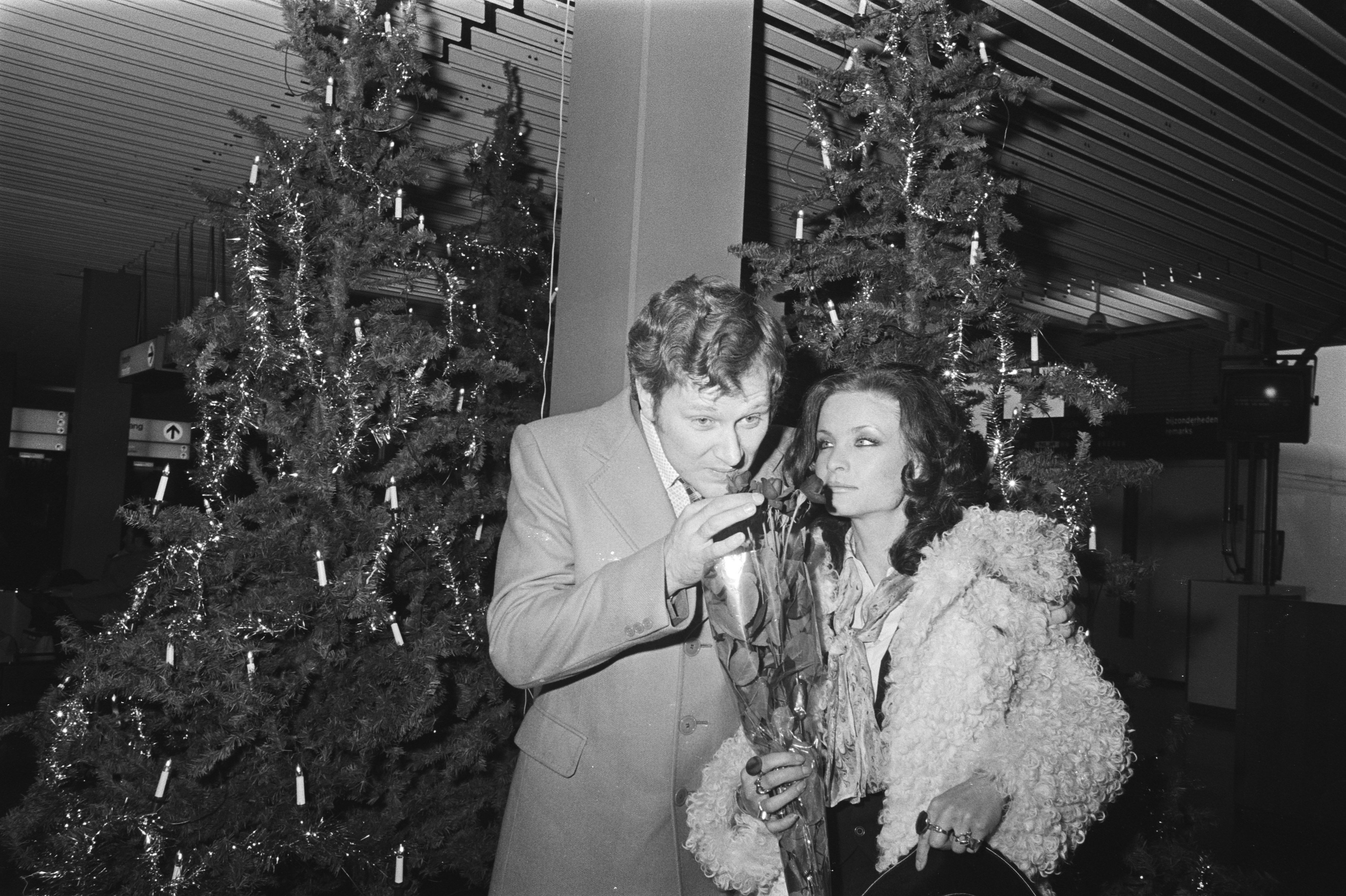 Collectie / Archief : Fotocollectie Anefo Reportage / Serie : [ onbekend ] Beschrijving : Paul Merrony en Jane Maxwell (uit The Hammonds ) op Schiphol; Colin Baker (Paul Merrony) en Kate O'Mara (Jane Maxwell) bij de kerstboom / Datum : 17 december 1976 Trefwoorden : kerstbomen Instellingsnaam : Schiphol Fotograaf : Verhoeff, Bert / Anefo Auteursrechthebbende : Nationaal Archief Materiaalsoort : Negatief (zwart/wit) Nummer archiefinventaris : bekijk toegang 2.24.01.05 Bestanddeelnummer : 928-9420 Reacties Geplaatst door TV-serie fan op 14 juli 2015 - 23:08. BBC televisieserie 'The Brothers' (1972-1976) over het transportbedrijf Hammond, uitgezonden in Nederland onder de naam 'de gebroeders Hammond' bij de AVRO televisie.(oktober 1974-1977)